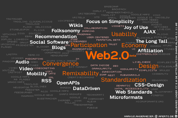 Mindmap Web 2.0 Memes